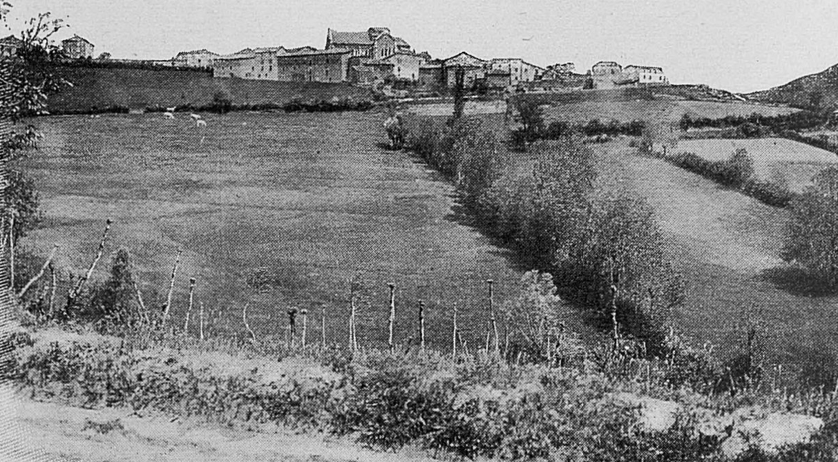 Dictionnaire illustré des communes du département du Rhône. Tome 1 / par MM. E. de Rolland et D. Clouzet.